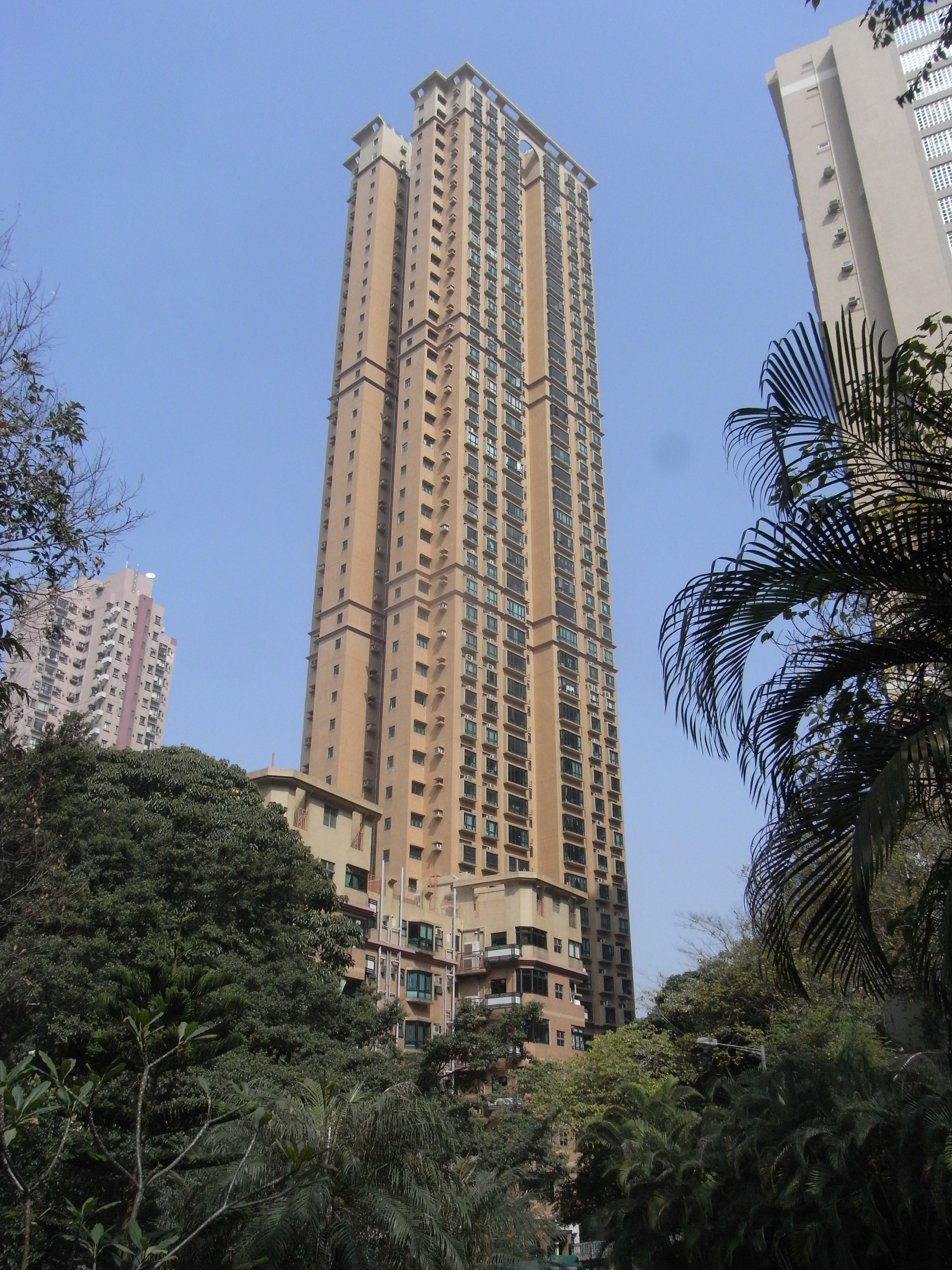 中文（香港）: 香港島干德道